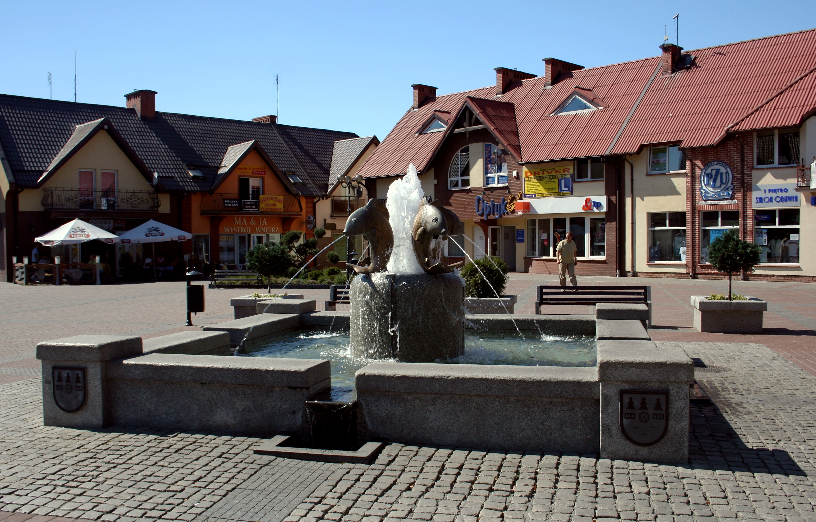 Fontanna na rynku w Czersku